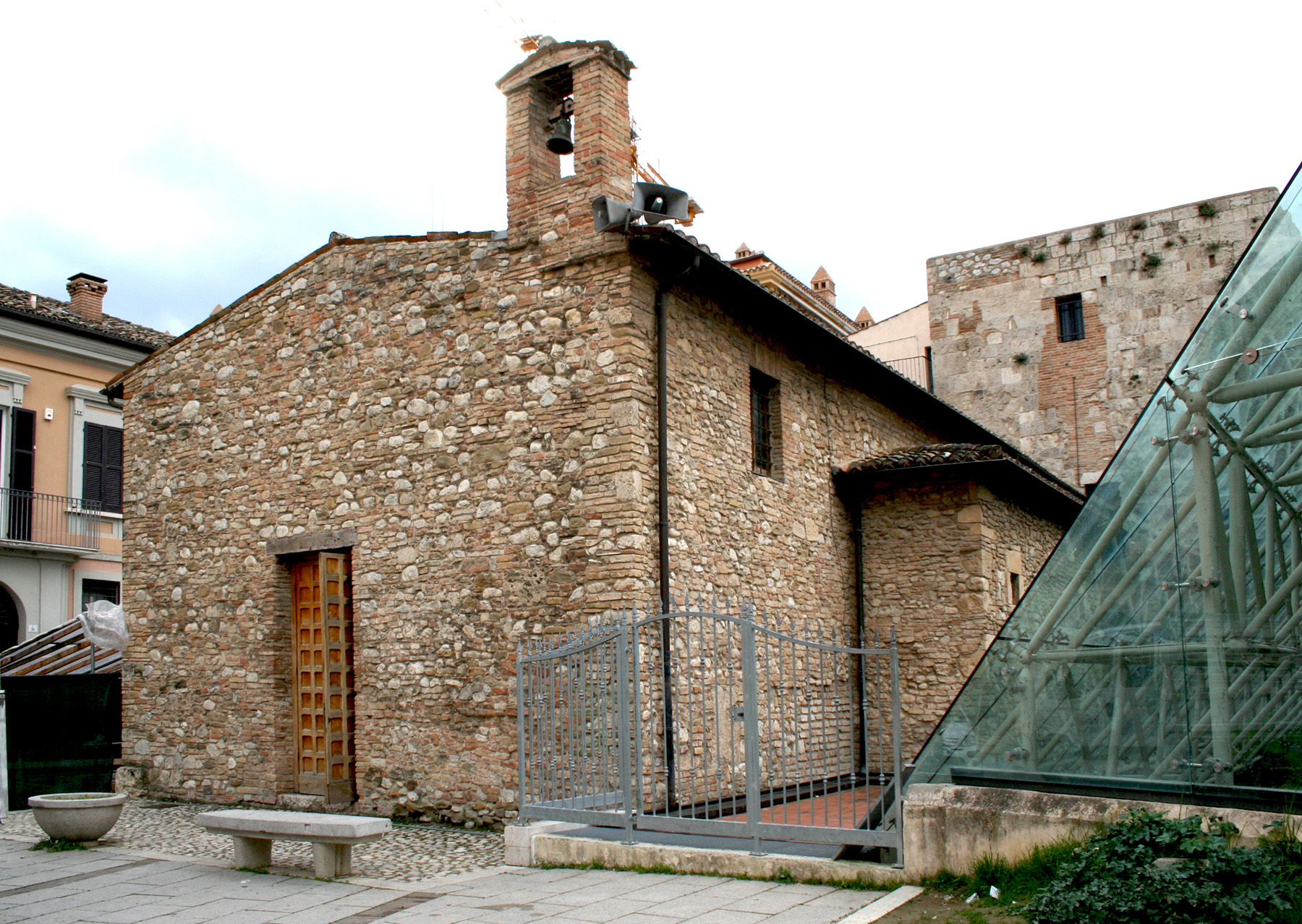 Chiesa di Sant'Anna dei Pompetti di Teramo, prospetto, esterno giorno.